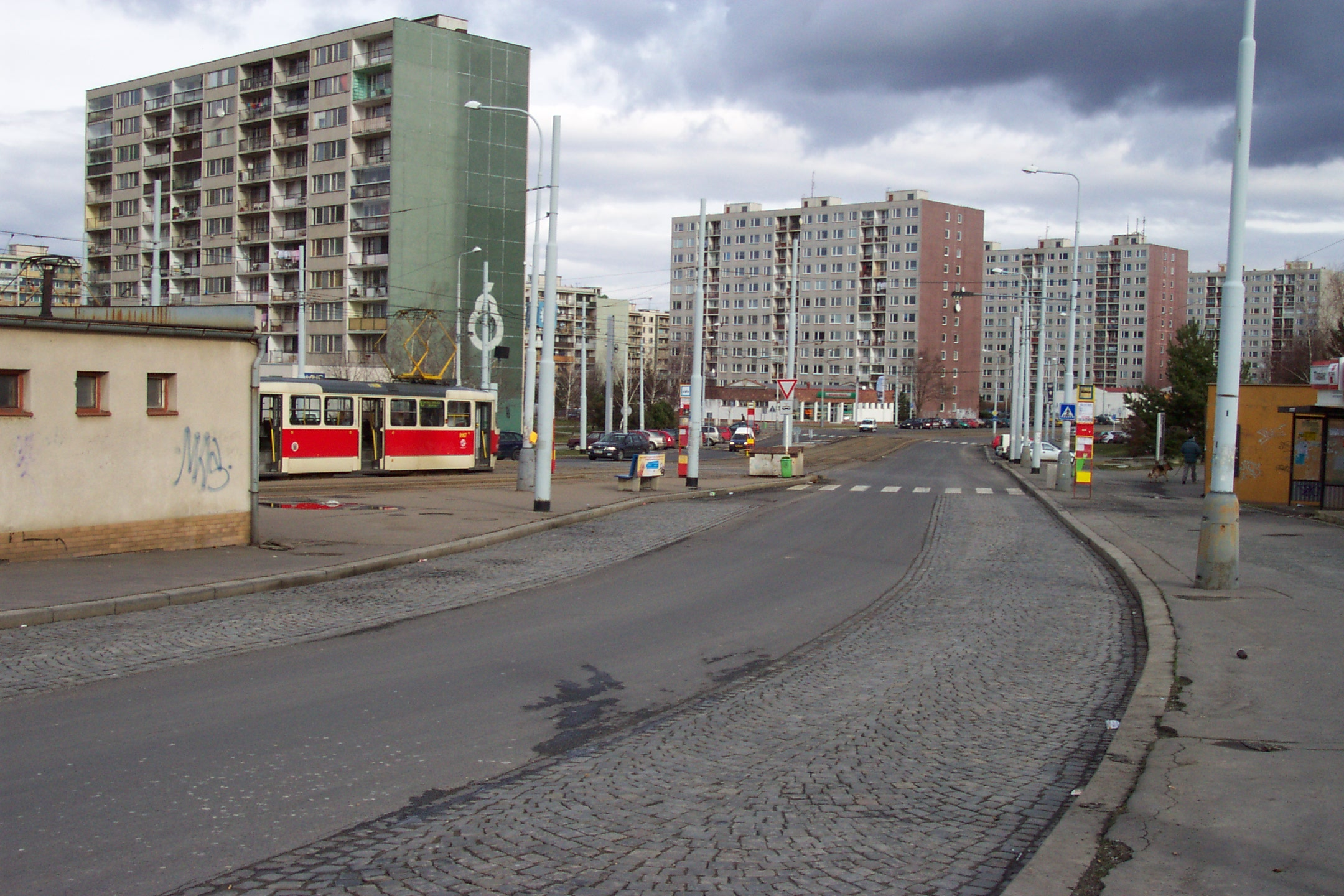 Praha Řepy, tramvajová konečná - Prague Řepy, tram end station